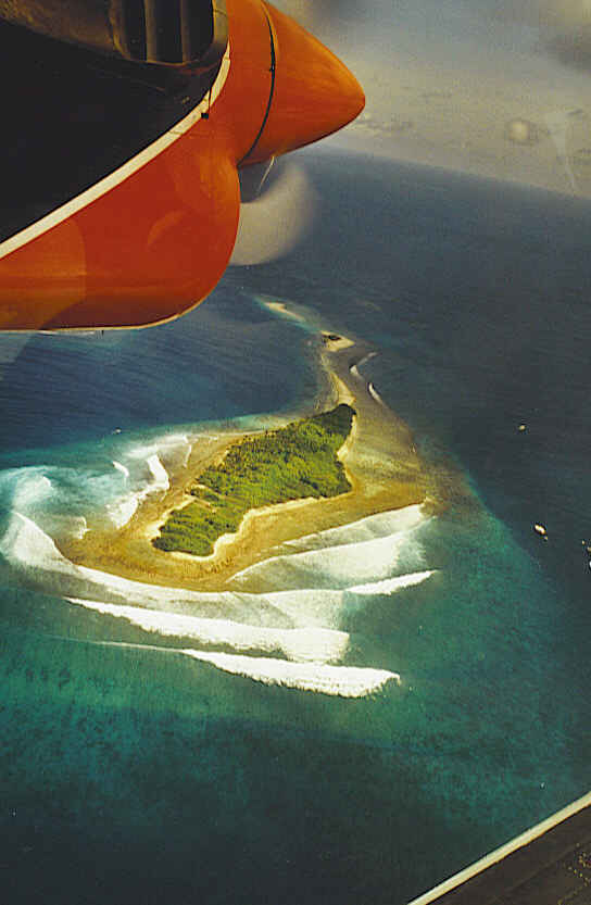 Auf dem Flug nach Helengeli Aufnahmeort: Über dem Indischen Ozean